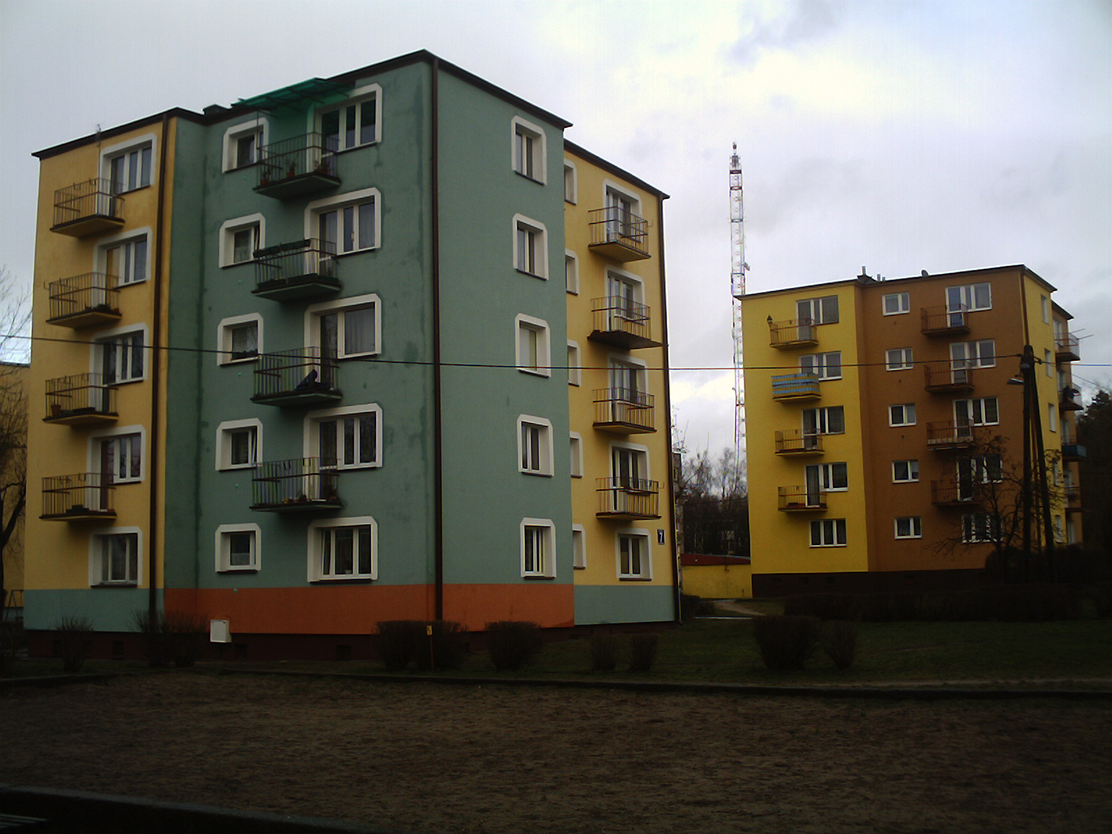 Zdjęcie przedstawia Osiedle Parkowe. autor zdjęcia B.N.